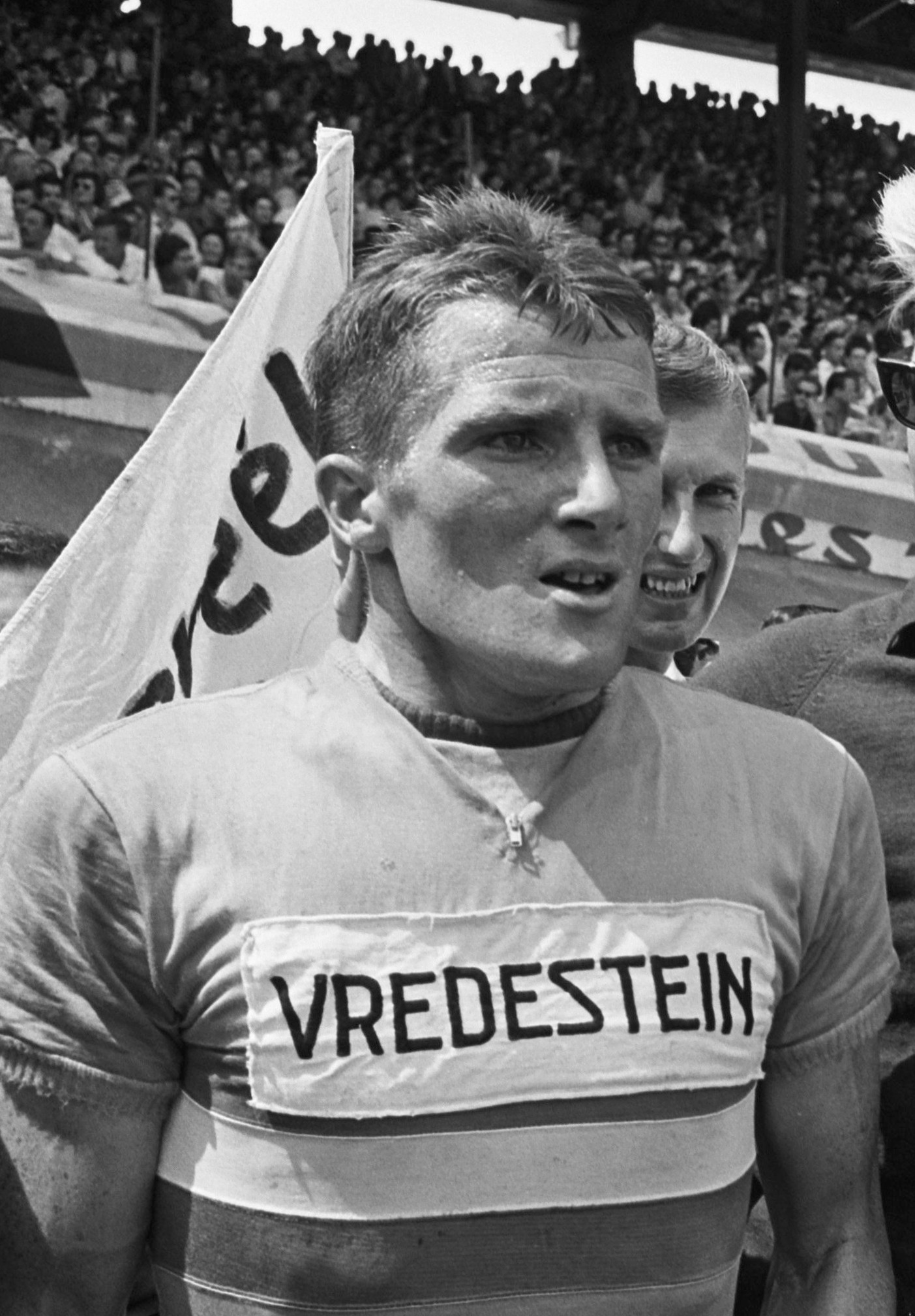 Tour de l'Avenir, Aankomst Parijs. Bart Zoet